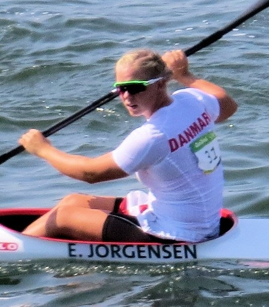 Sx50